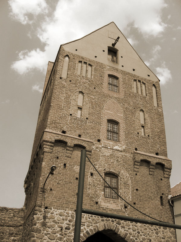 Brama Szczecinie w Gartz (Uckermark w Brandenburgii, Niemcy.)